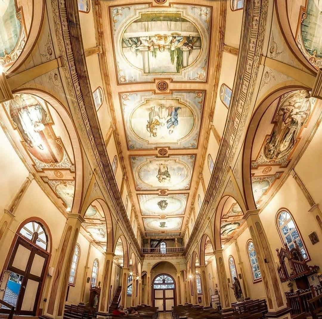 La Iglesia San Jacinto de Malvas es Patrimonio Cultural del Ecuador al ser una emulación de la Capilla Sixtina del Vaticano